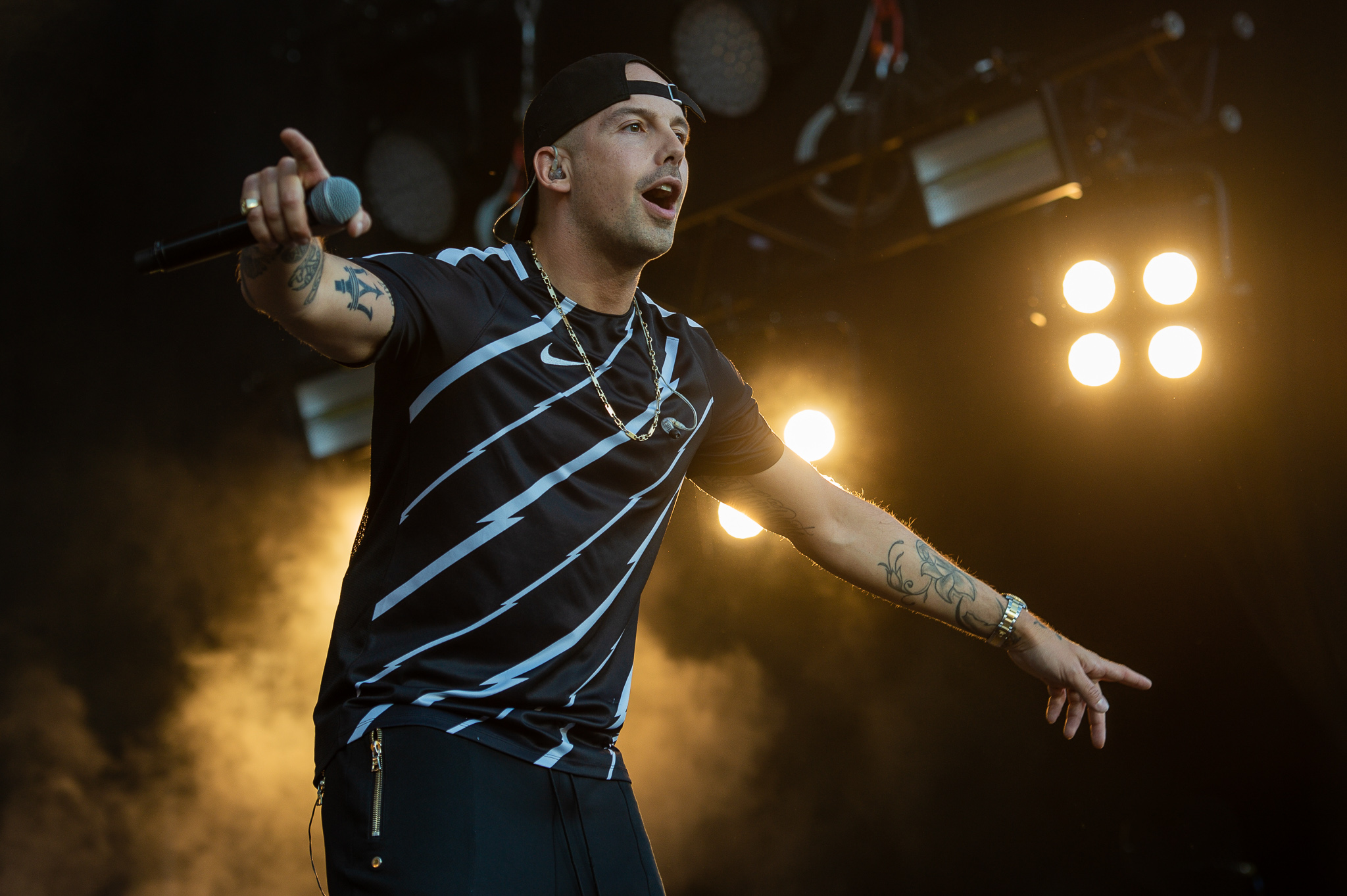 ARGO-Konzerte,Beck's Park Stage,Festival,Konzert,Livekonzert,Livemusik,Musik,RAF Camora,RiP,Rock im Park 2018